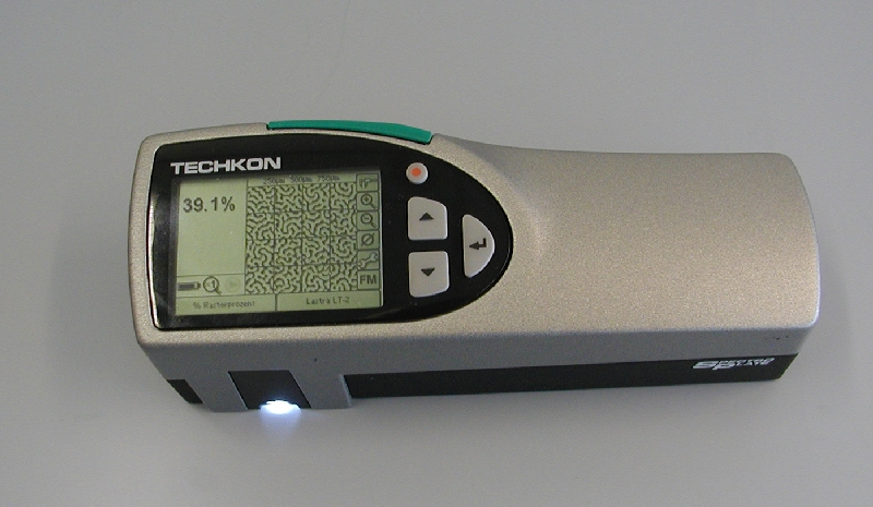 Ein Druckplattenmessgerät